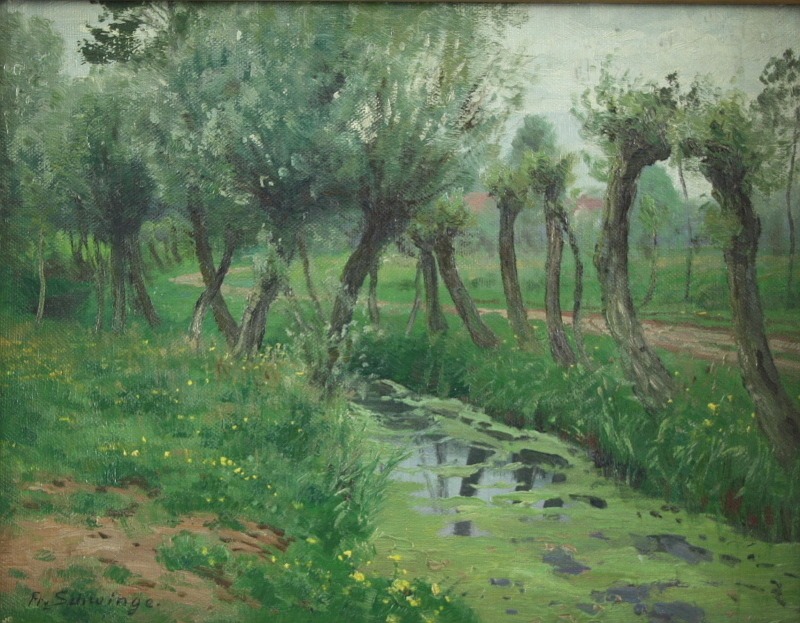 Kopfweiden am Bach bei Altenwerder.